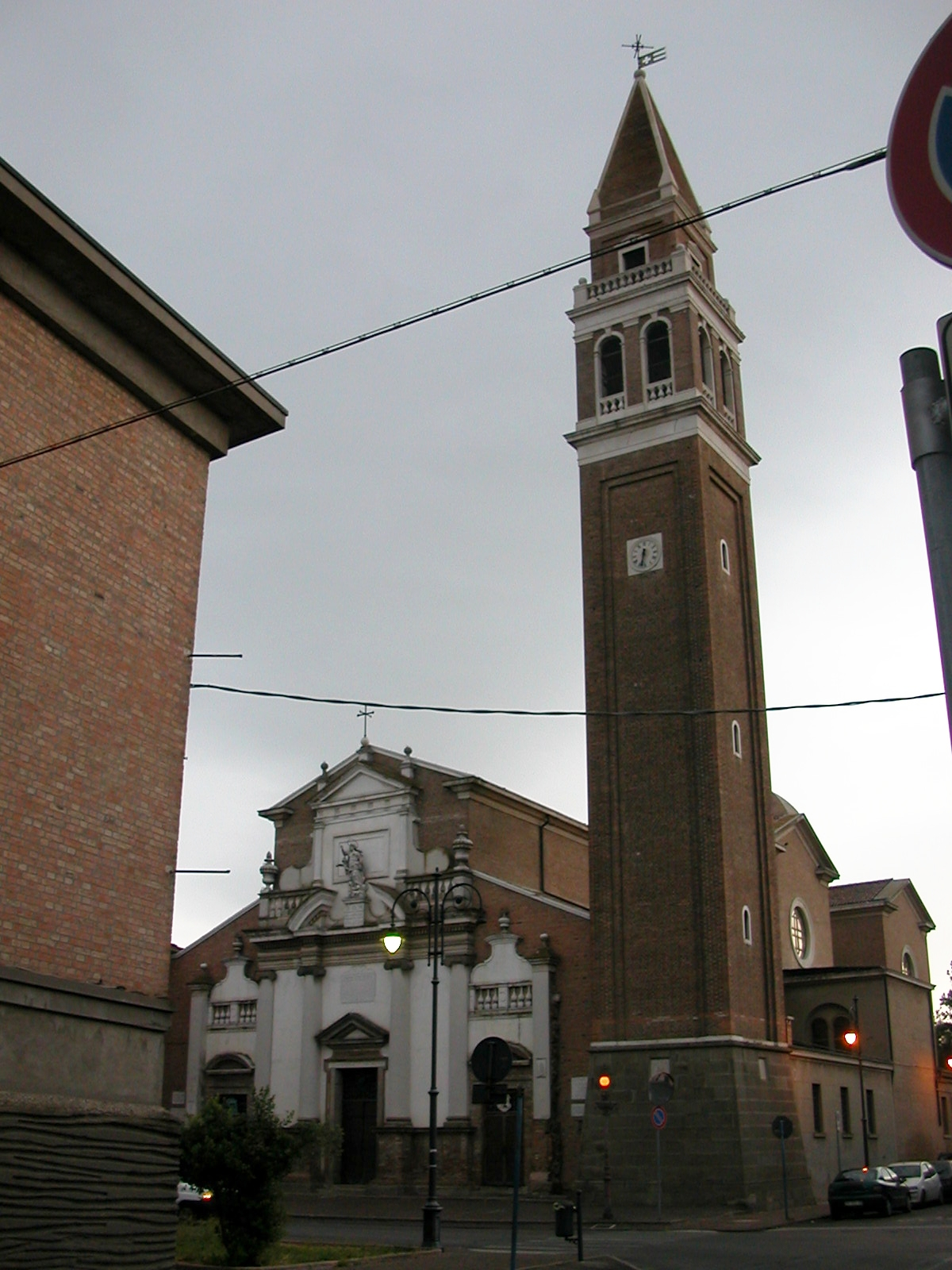 Chiesa parrocchiale di Santa Maria Assunta (detta la Tomba), Adria